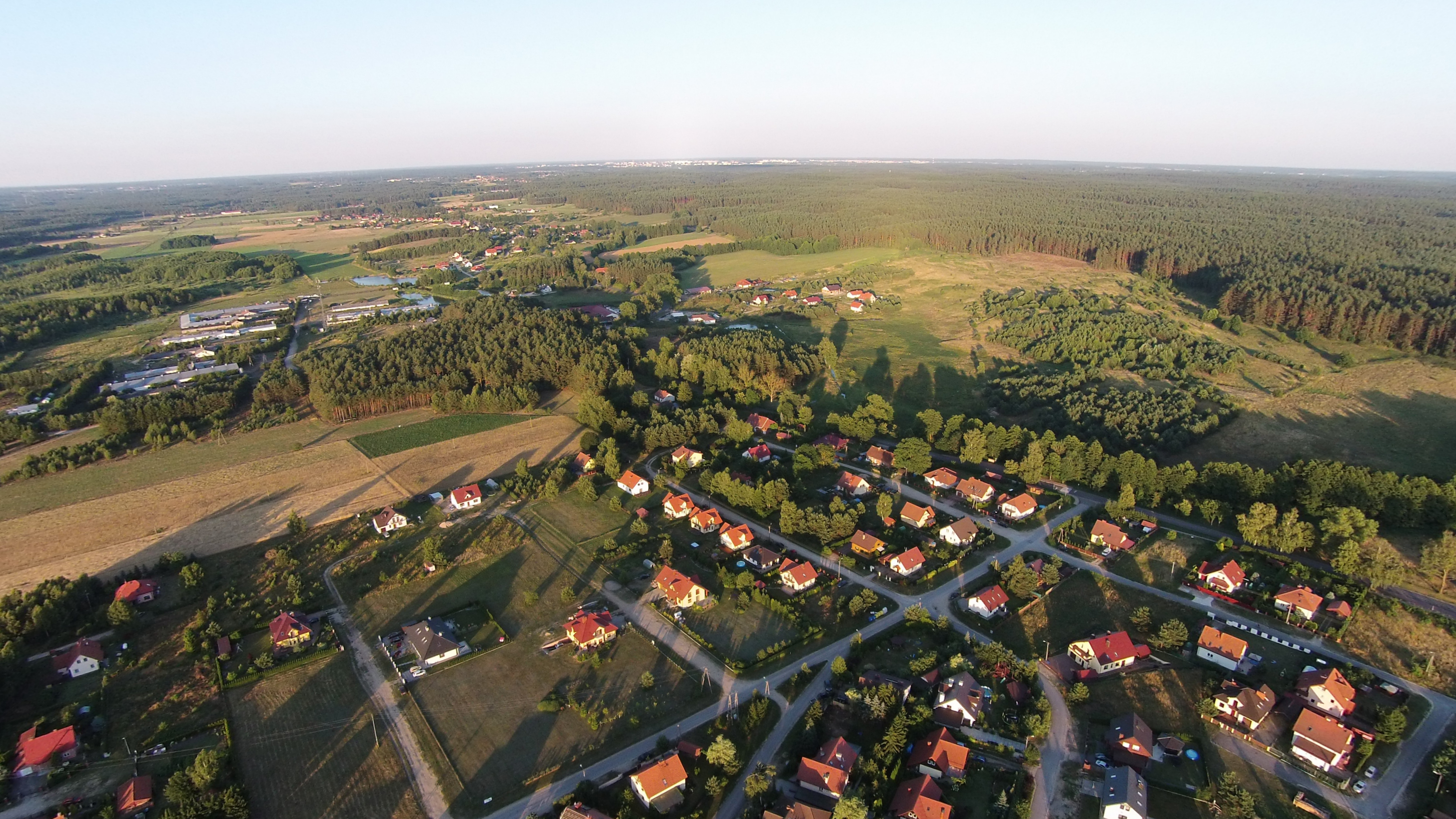 Giedajty z lotu ptaka. Widok w kierunku wschodnim, w tle Olsztyn